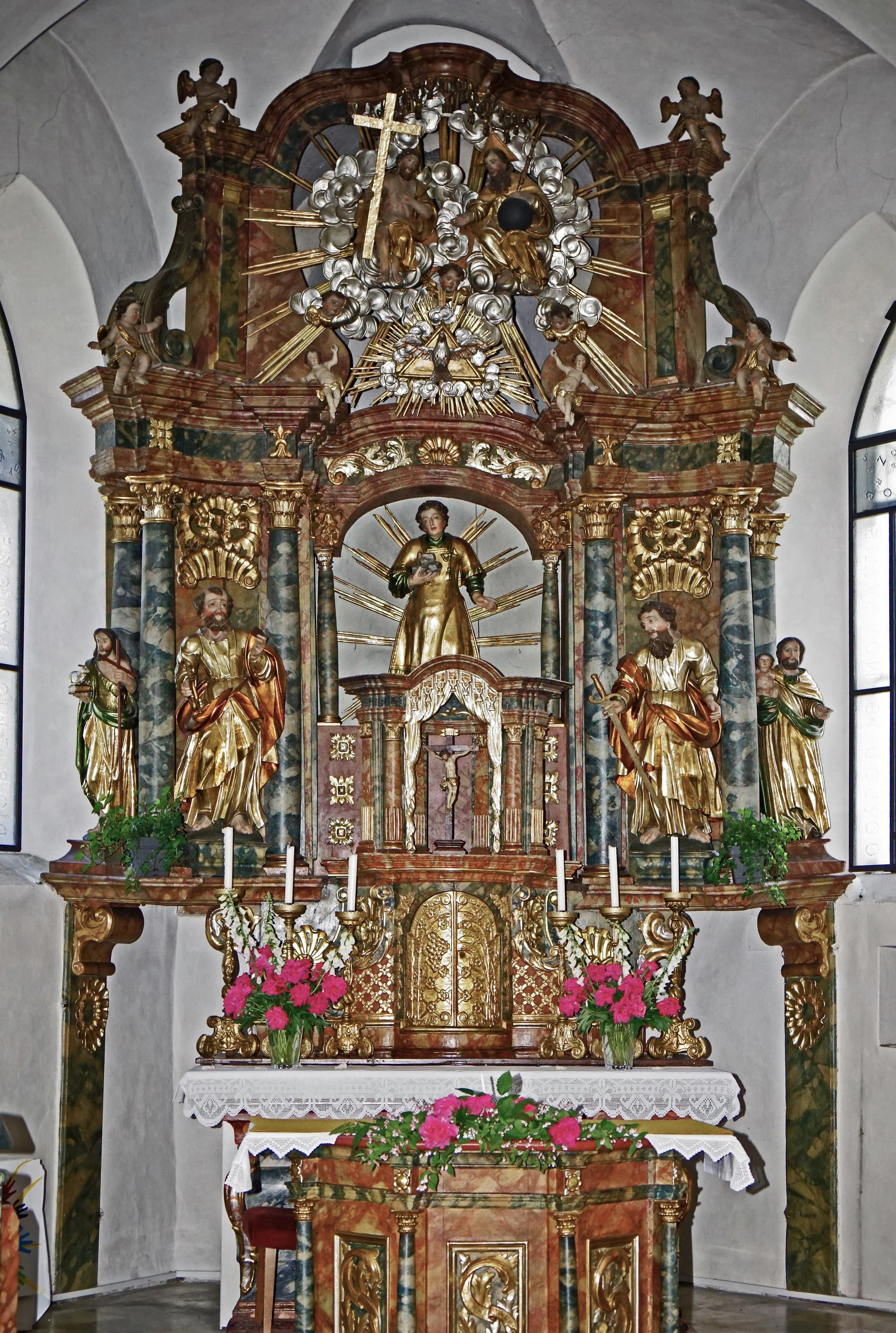 Kath. Pfarrkirche St. Stefan (Finkenstein), barocker Hochaltar